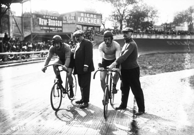 Buffalo, 7 mai 11, match Parent-Darragon